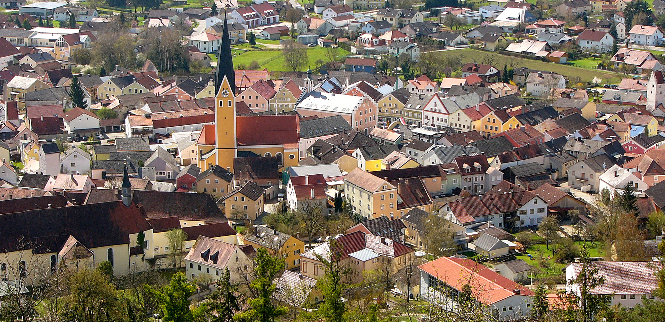 Ensemble Altstadt und Untere Vorstadt Dietfurt an der Altmühl. Das Ensemble Dietfurt umfasst die ursprünglich ummauerte Altstadt einschließlich des Grabenbereiches und die Untere Vorstadt. This is a photograph of an architectural monument.